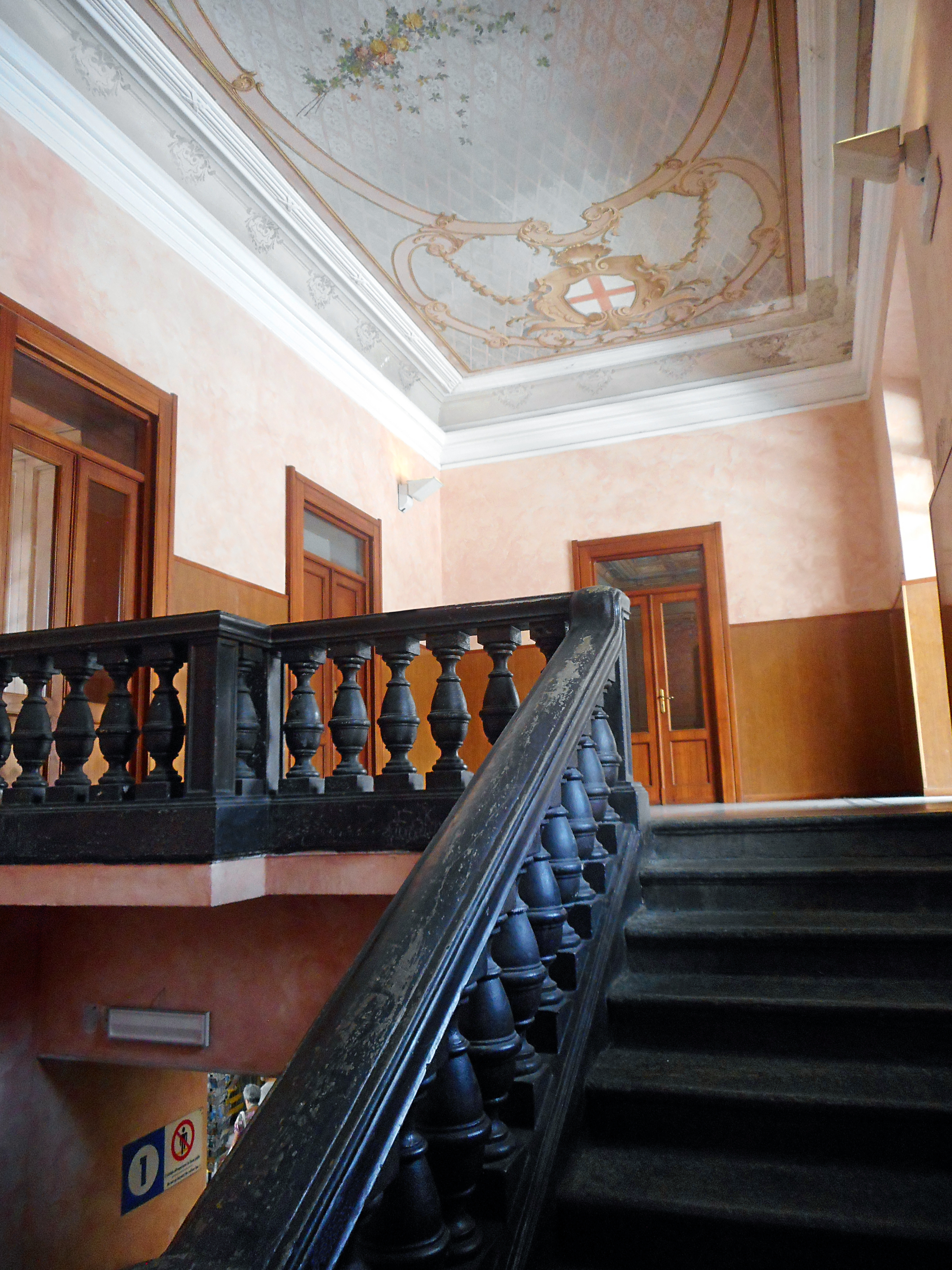 Italien - Alassio, Ligurien; Bahnhofsgebäude: Deckengemälde im ersten Stock, der zu den Bahnsteigen führt.